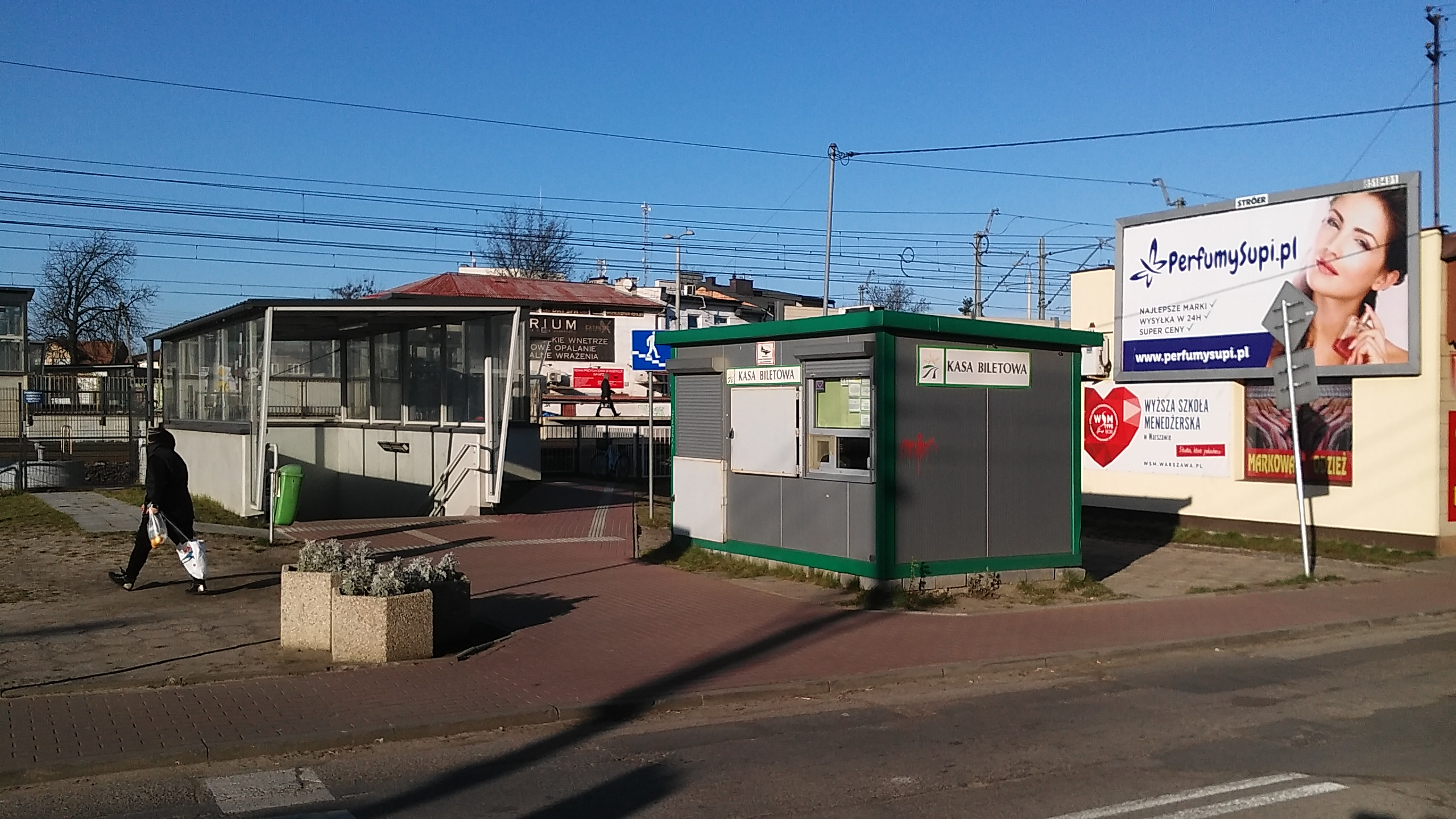 przystanek kolejowy Kobyłka - kasa biletowa i południowe wejście do przejścia podziemnego